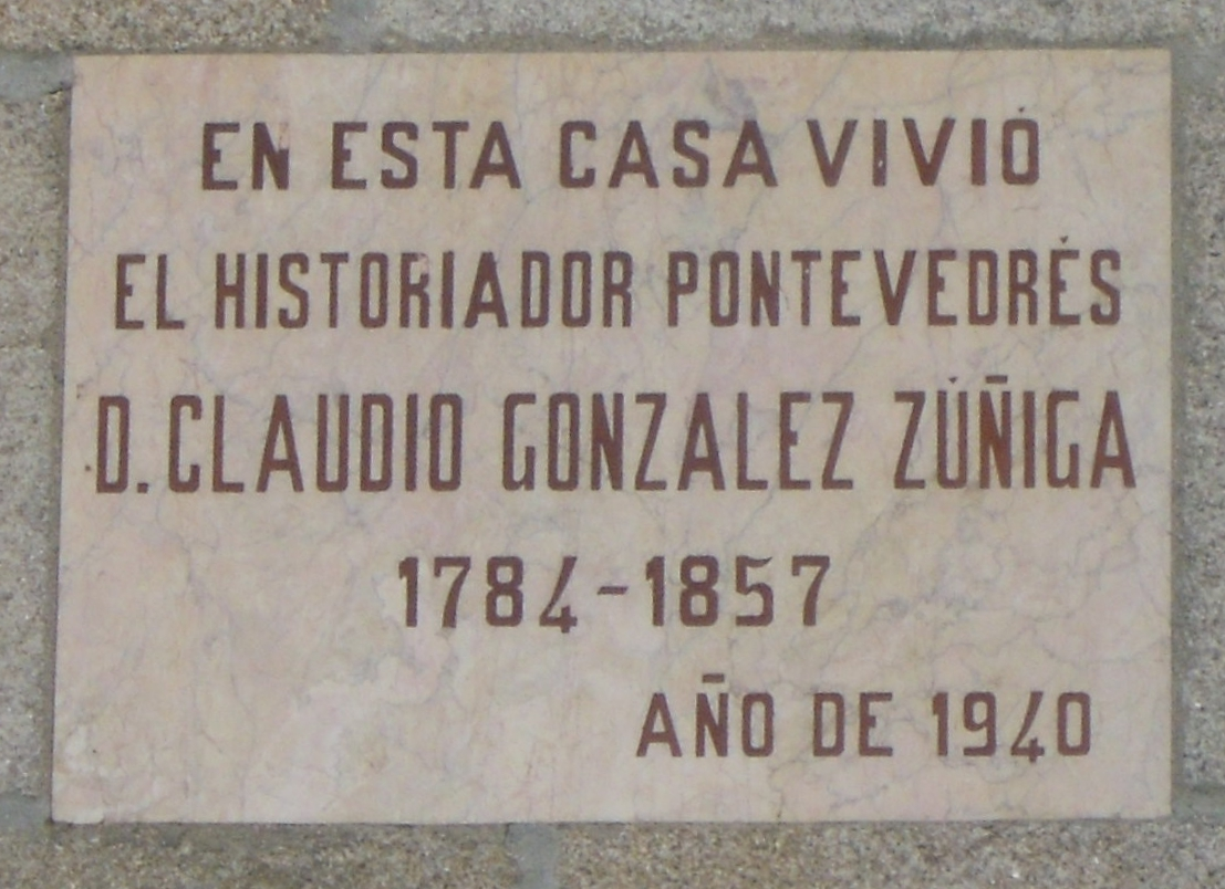 Placa na casa en que viviu Claudio González Zúñiga en Pontevedra, na rúa que hoxe leva o seu nome trala capela da Peregrina.